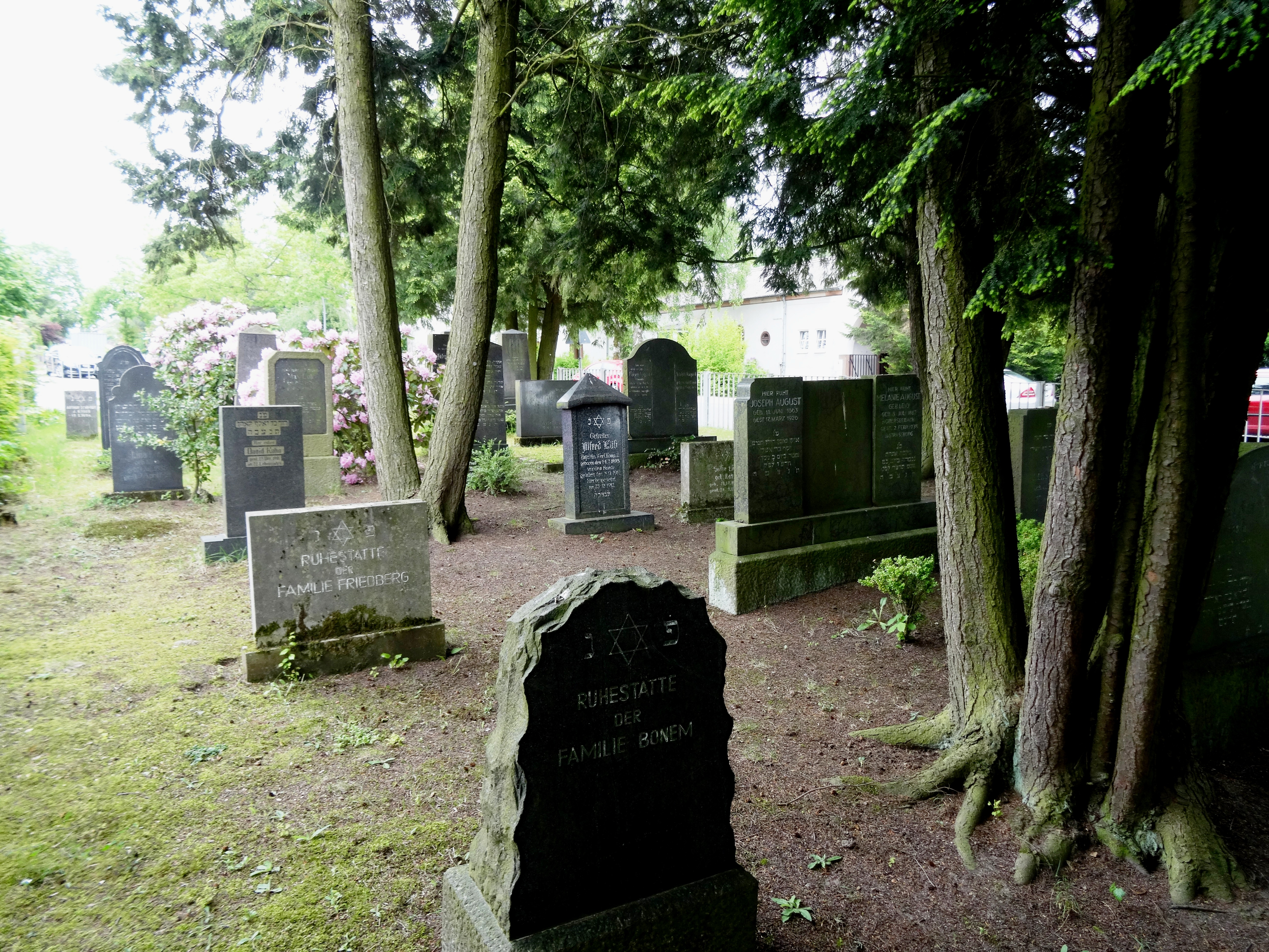 Alter jüdischer Friedhof in St. Ingbert